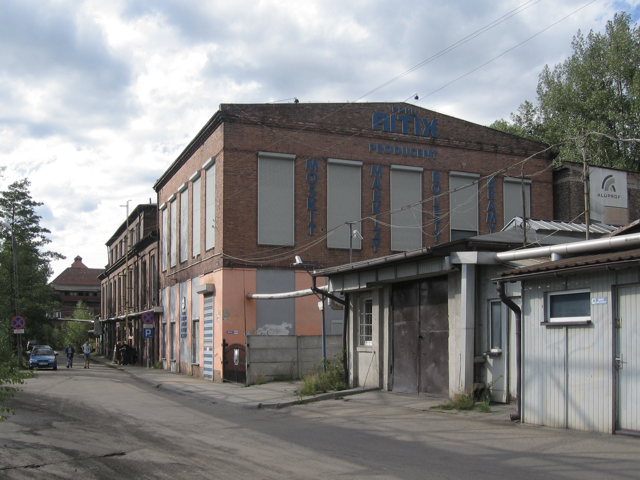 Budek biurowy i ambulatorium kopalni Neue Bleischarley (późniejsze Zakłady Górnicze im. Juliana Marchlewskiego) w Bytomiu, ul. Siemianowicka.